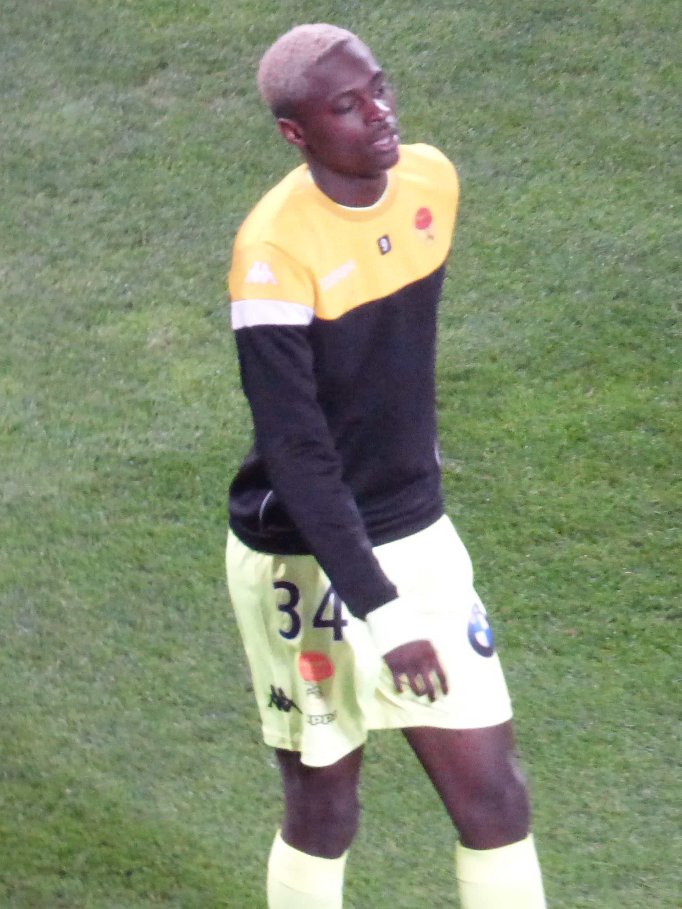 Aeron Zinga avant le match RC Lens / US Orléans, comptant pour la vingt-huitième journée du championnat de France de football de Ligue 2 2019/2020, le 9 mars 2020.